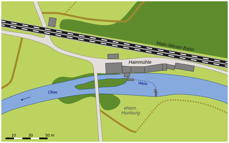 Lageplan Hainmühle (Betziesdorf) mit gekennzeichneter Lage der Hunburg (Betziesdorf).